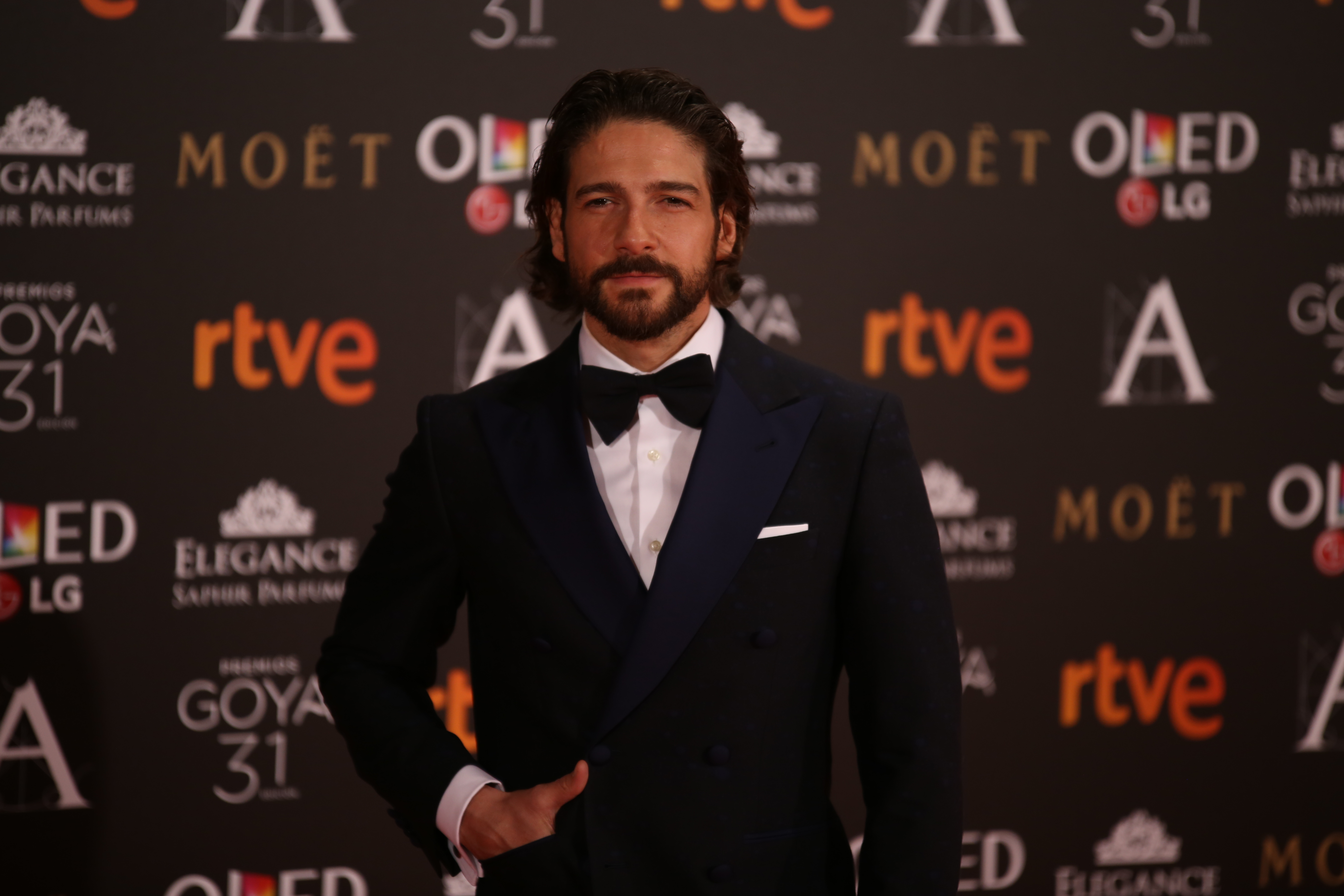 Premios Goya 2017